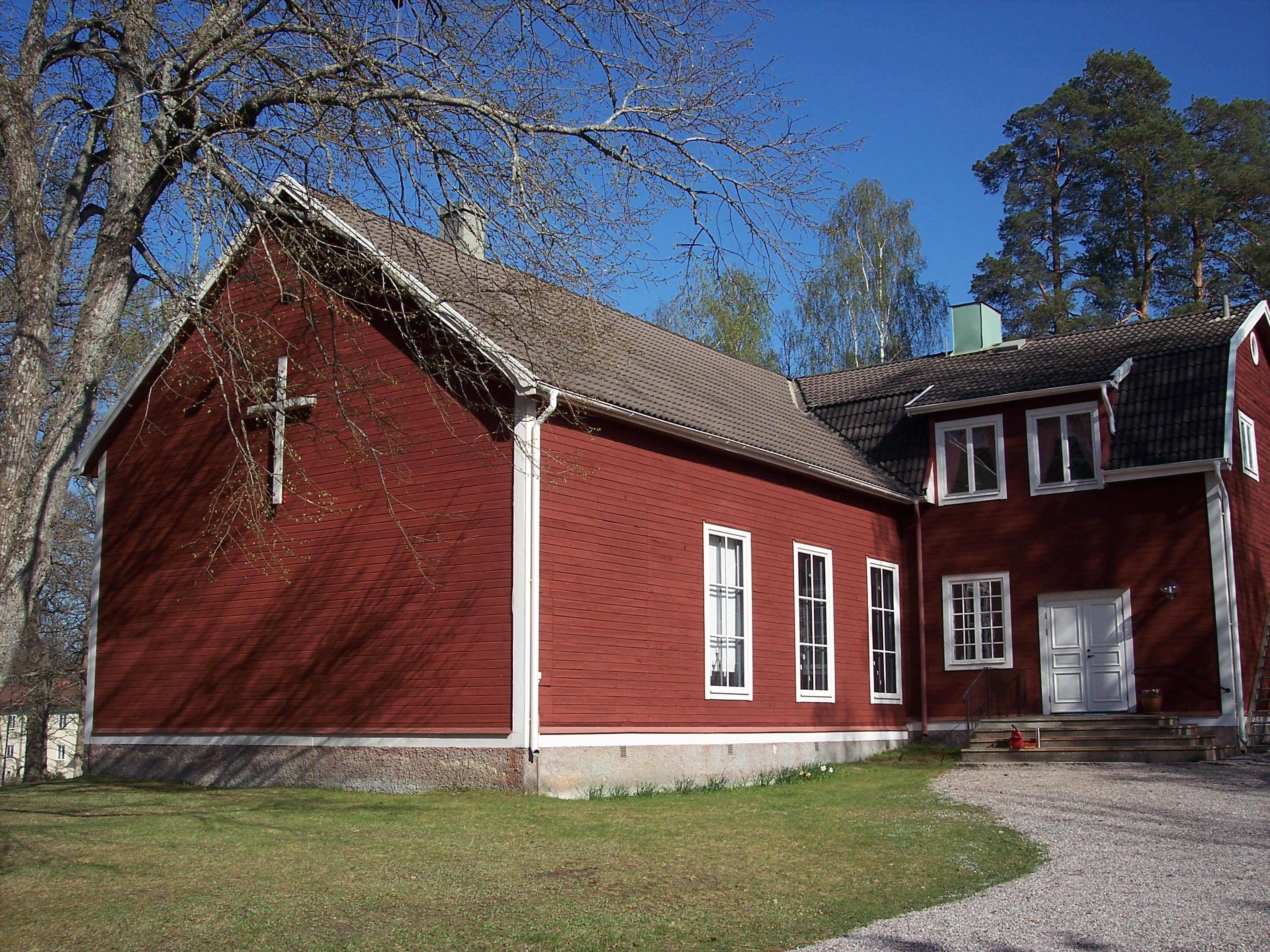 Högsjö kyrka, Södermanland, exteriör